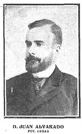 Retrato de Juan Alvarado y del Saz, recogido en la revista española Nuevo Mundo.